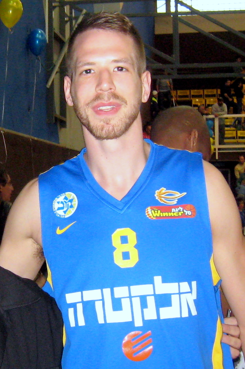 נייט לינהארט במדי מכבי ת"א